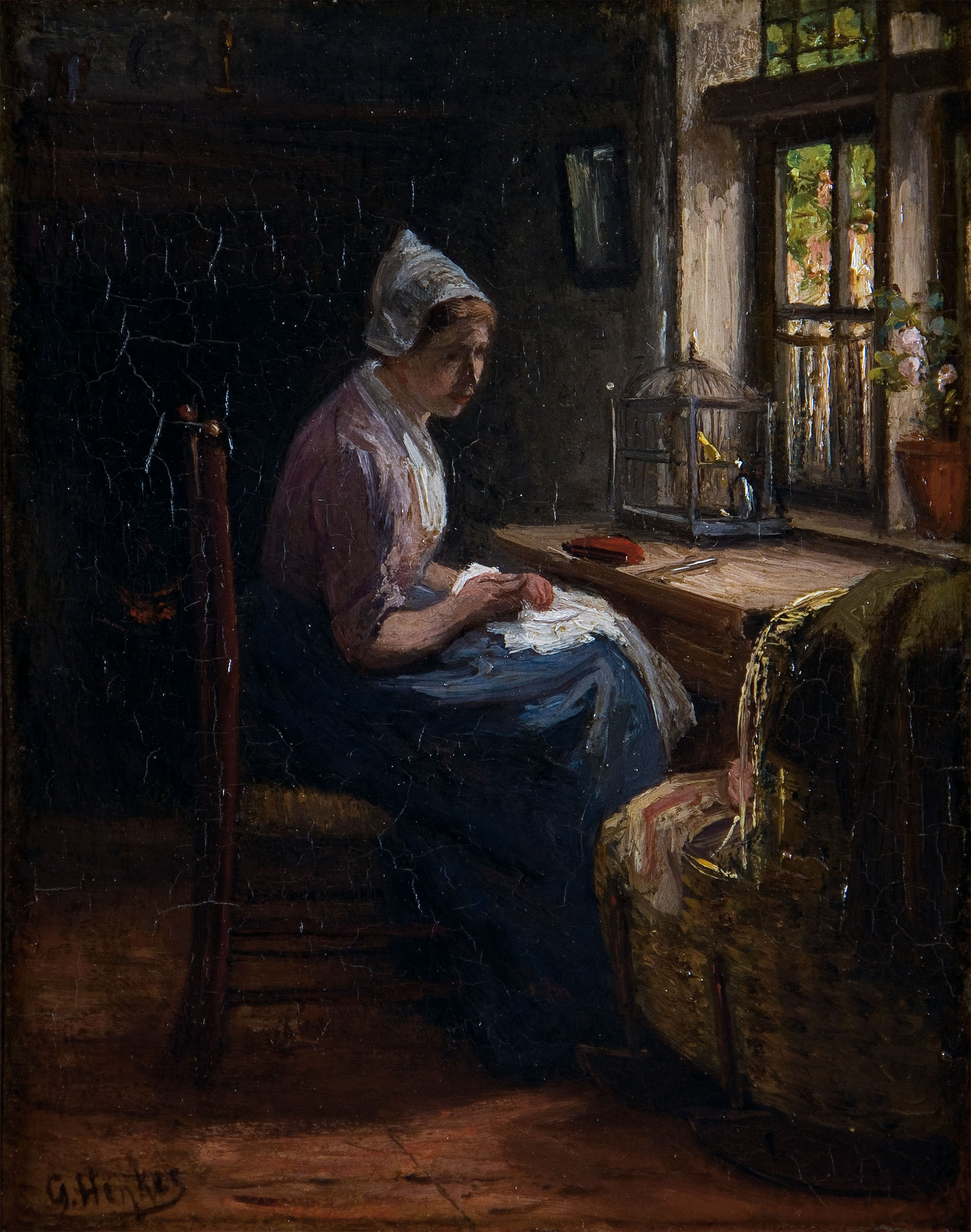 Mutterglück. Öl auf Holz. Signiert G. Henkes. Verso datiert 1915. 14,5 x 19 cm